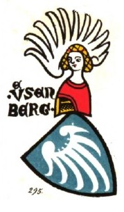 Wappen der Herren von Uesenberg im Zürcher Wappenbuch